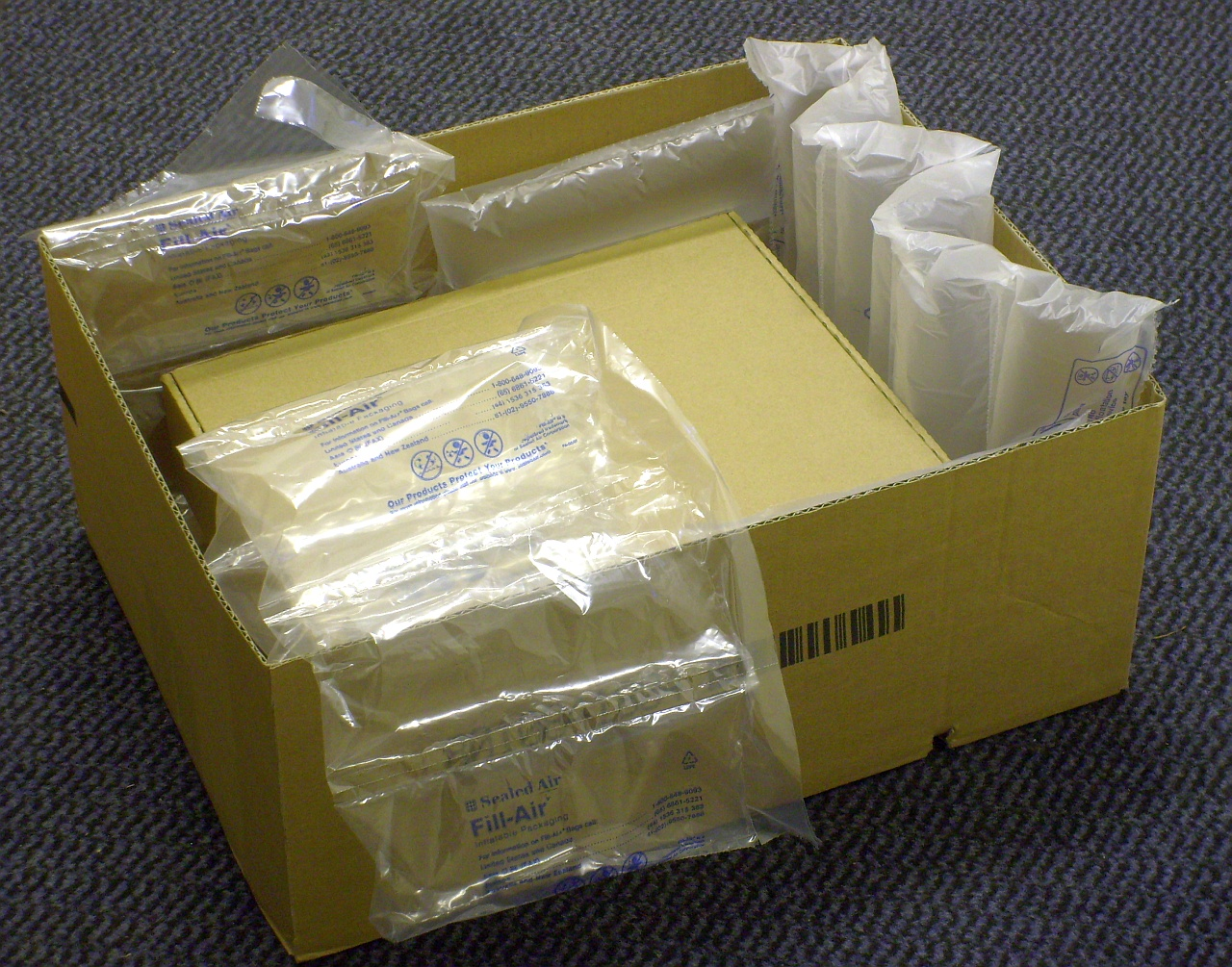 Luftkissen aus PE-Folie zum stoßsichernden Ausfüllen von Transportverpackungen